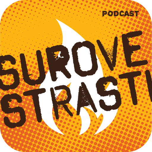 Logotip projekta Surove Strasti iz 2020. godine